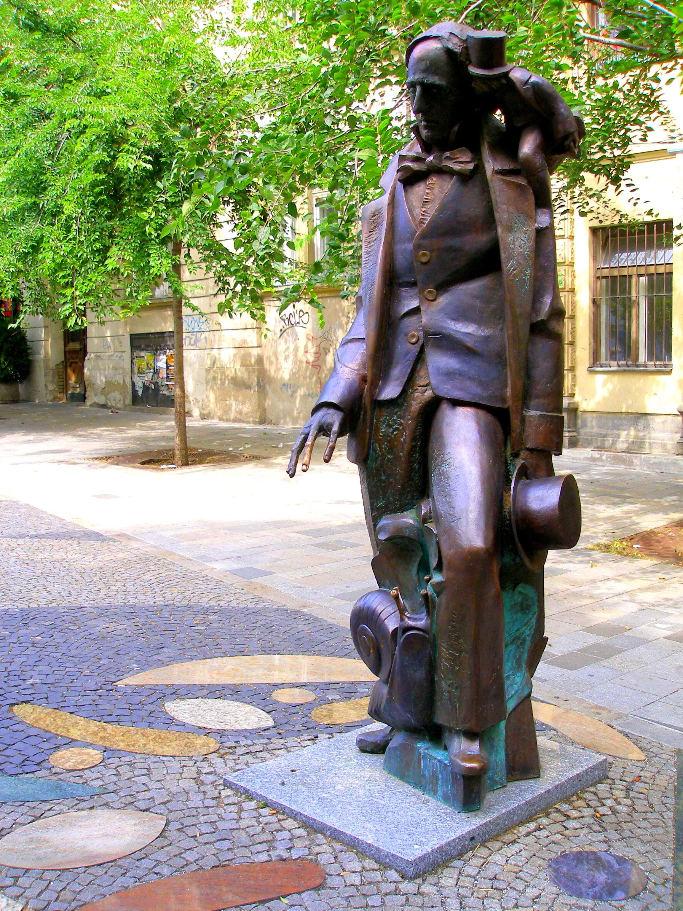 Hviezdoslavovo námestie Bratislava, H.Ch. Andersen socha. Socha Hansa Christiana Andersena ako pripomienka na rozprávkarovu návštevu Bratislavy v roku 1841. Bronzová socha nadživotnej veľkosti je dielom akademického sochára Tibora Bartfaya a obklopujú ju postavičky z Andersenových rozprávok.